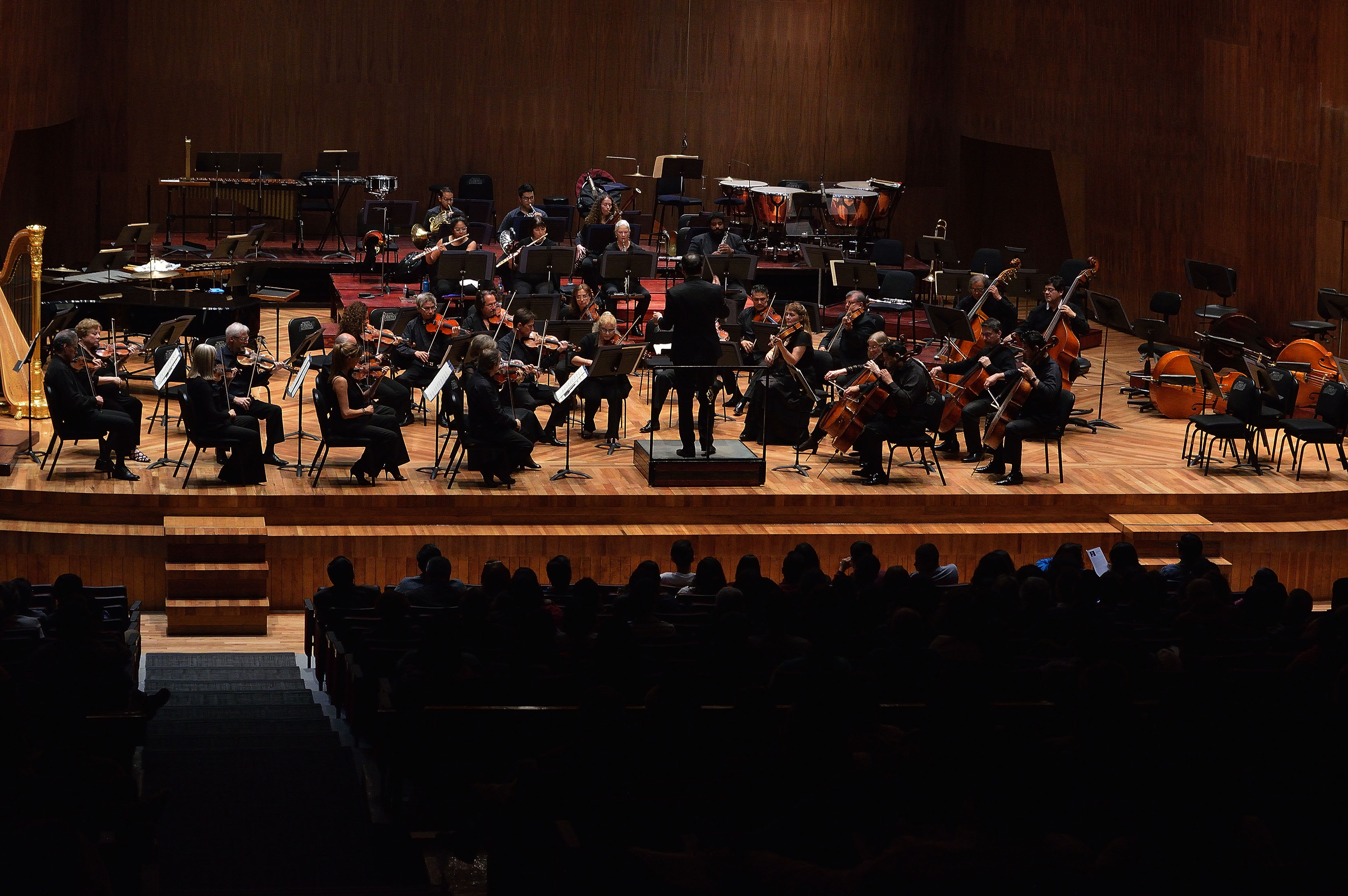 Domingo 11 de febrero de 2018 En la Sala Silvestre Revueltas del Centro Cultural Ollin Yoliztli, la Orquesta Filarmónica de la Ciudad de México ofreció un programa dedicado a celebrar el 75 aniversario de El Colegio Nacional, con la Sinfonía Núm.2, Romántica, de Eduardo Mata, compositor que perteneció a esta institución dedicada a difundir las ciencias, artes y humanidades de México, además de El presidente baila, de John Adams, y la Sinfonía Núm.6, La mañana, de Franz Joseph Haydn, bajo la dirección del huésped Armando Pesqueira. Fotografía: Angélica Galvez / Secretaría de Cultura CDMX